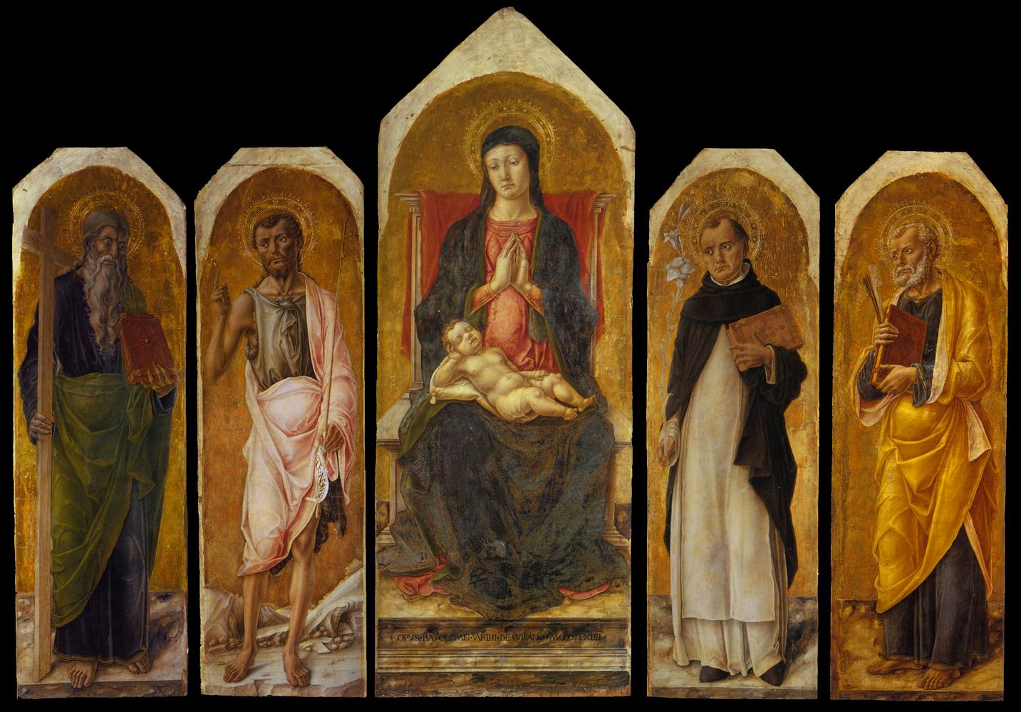 Polyptych